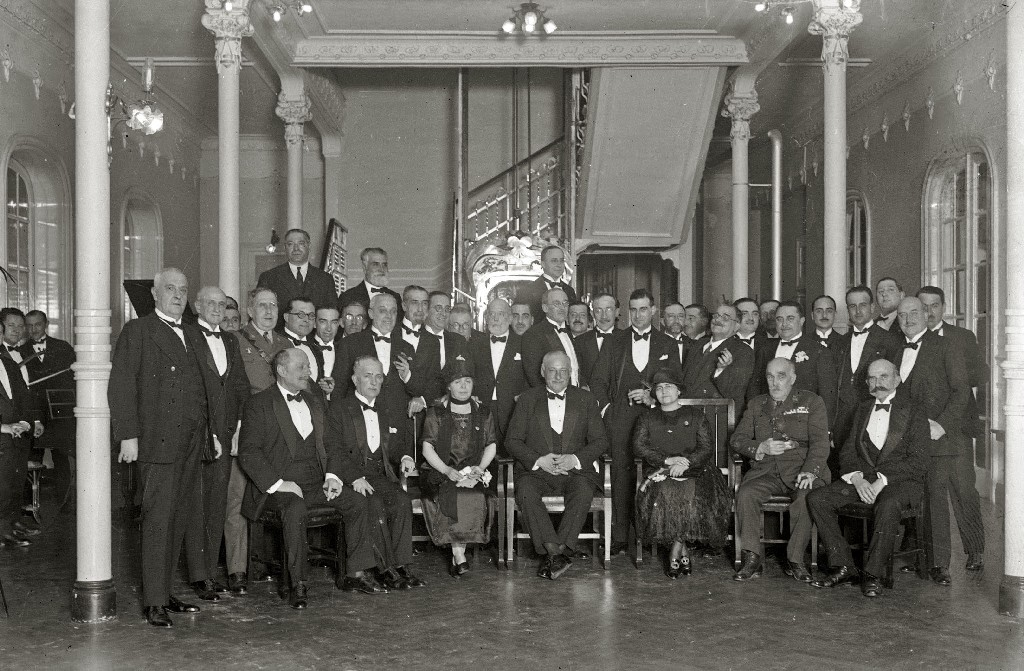 Título original: Diferentes personalidades en un restaurante, entre ellos se encuentra el general Miguel Primo de Rivera, el alcalde de San Sebastián Juan José Prado, el presidente de la Diputación Vicente Laffitte (1/1) Localización: San Sebastián (Guipúzcoa)